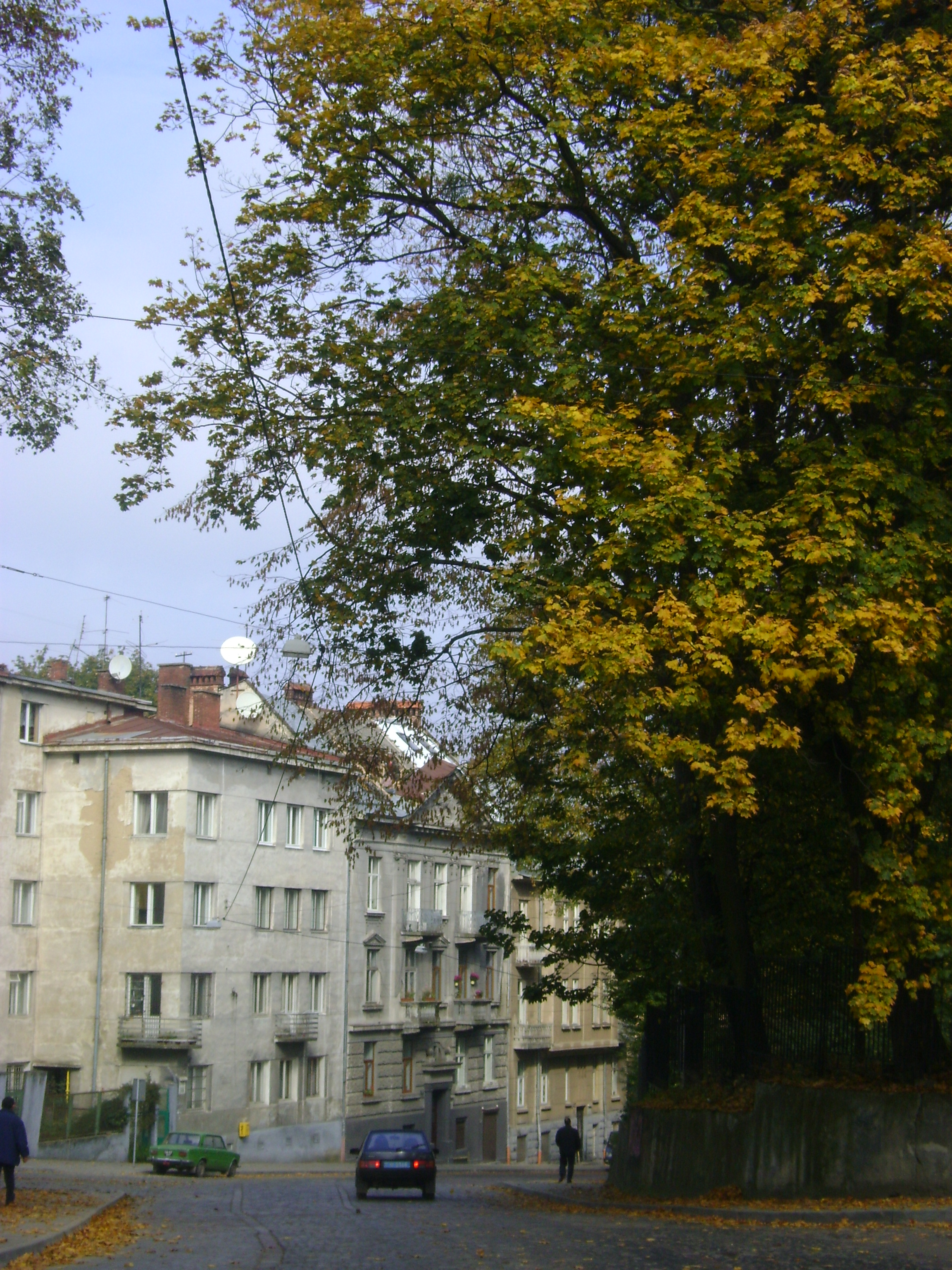 Софіївка1.jpg